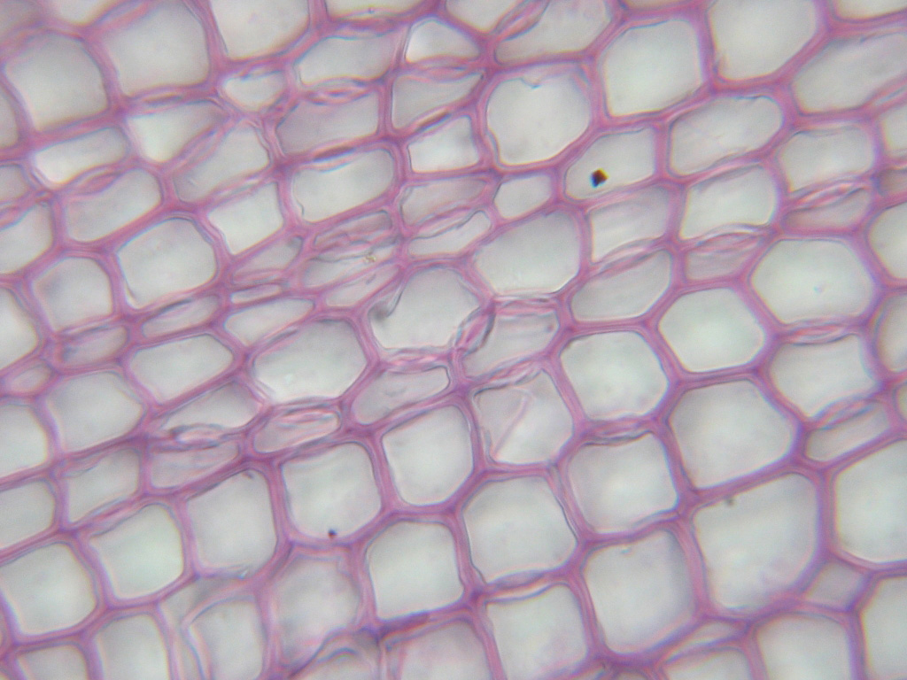 Drewno sosny - przekrój poprzeczny